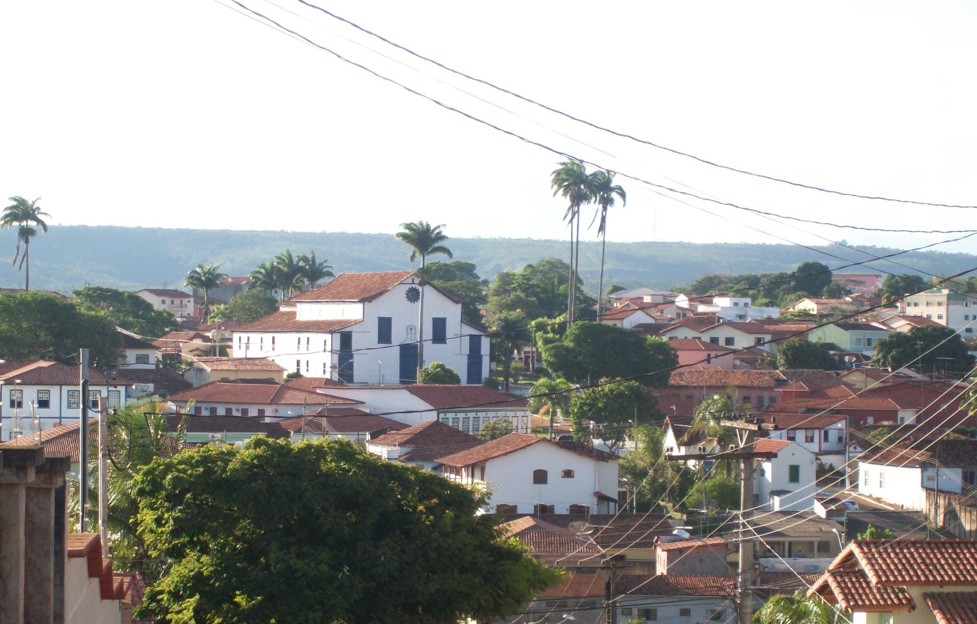 Paracatu MG Brasil - Vista Parcial da cidade